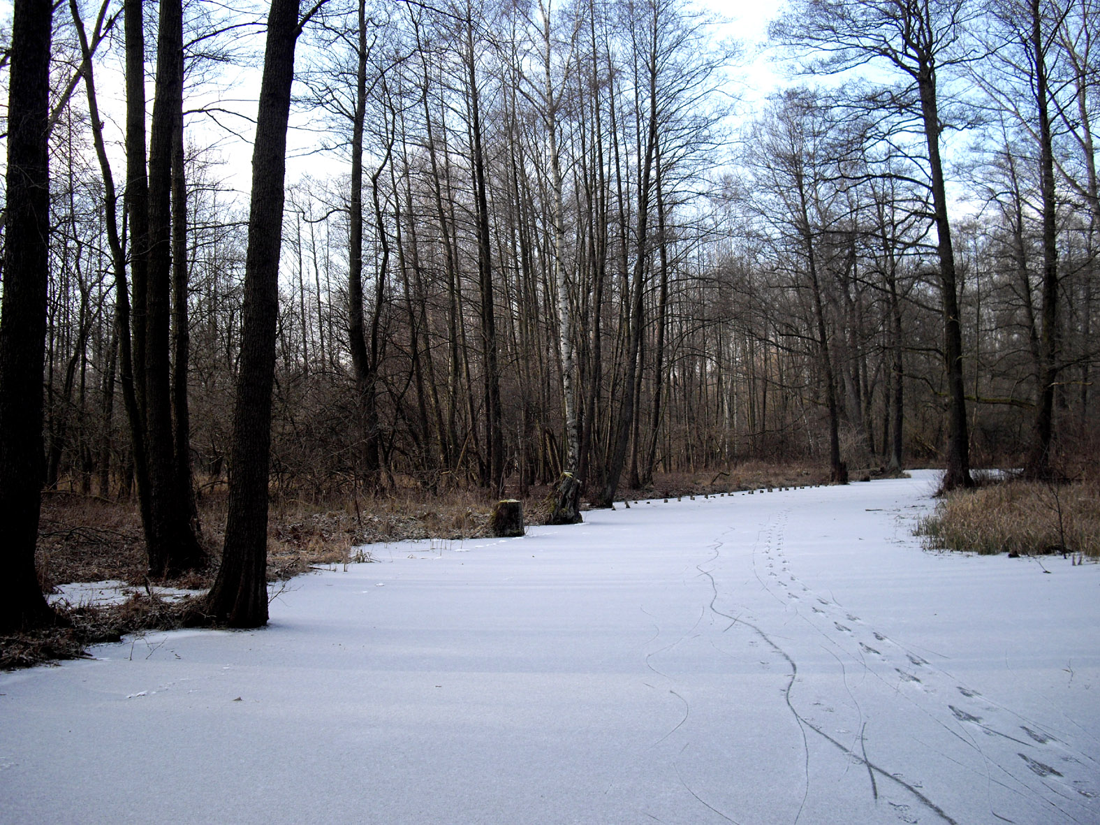 Huschepusch